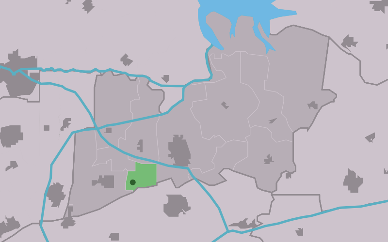 Kaartsje fan himrik fan Feankleaster